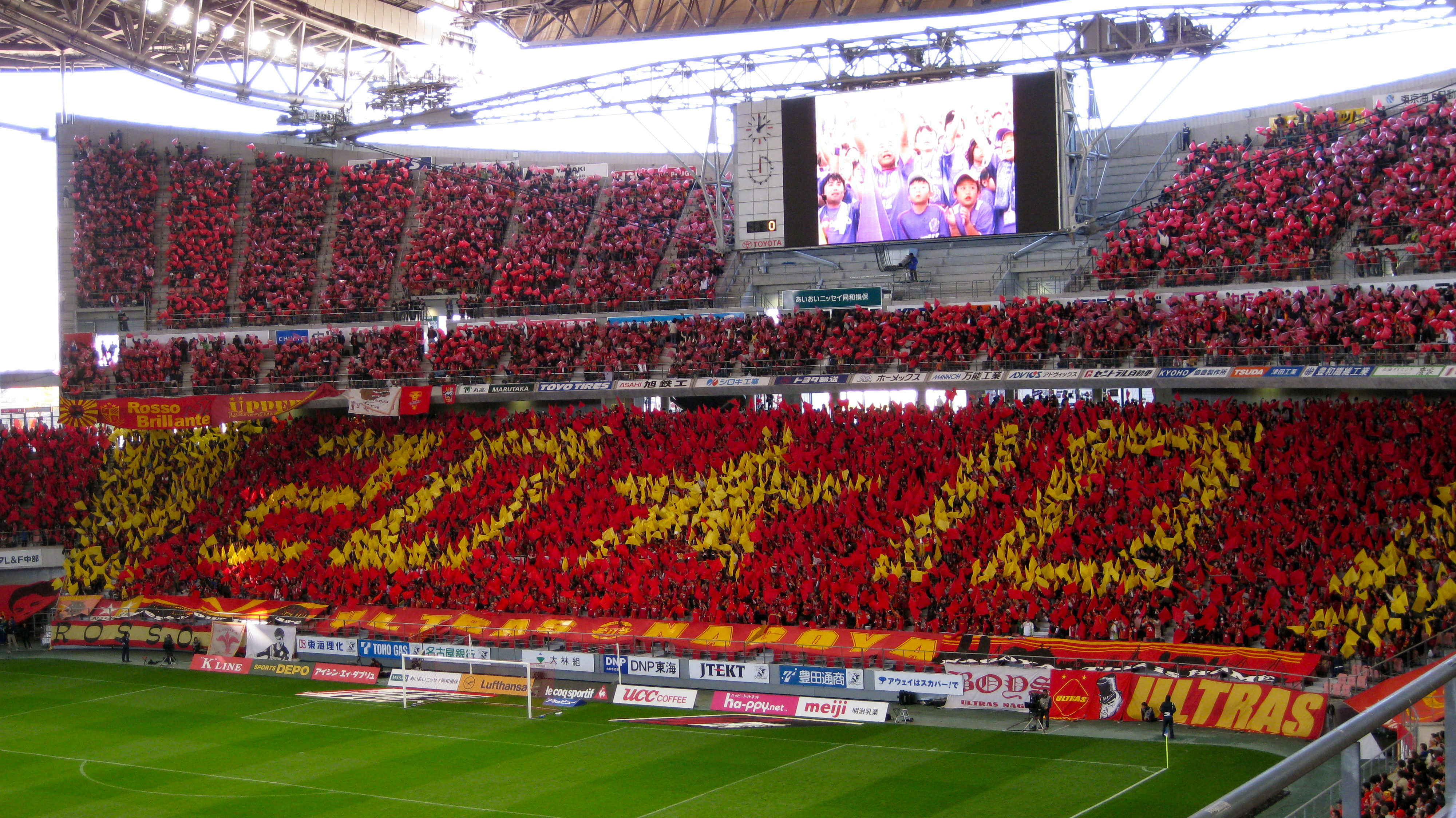 豊田スタジアム #名古屋グランパスサポーター